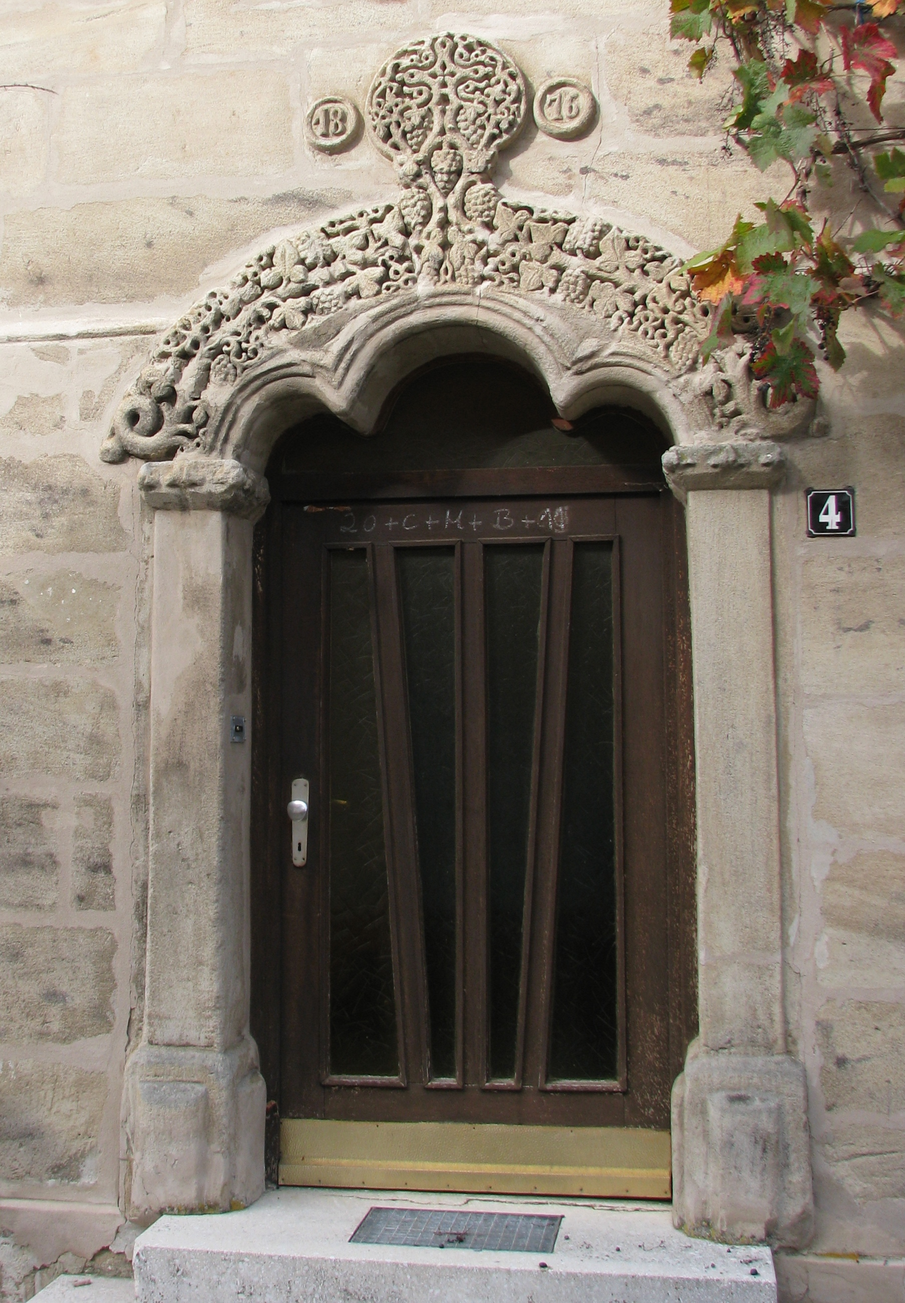 Selingstadt, Gemeindeteil der Stadt Heideck im mittelfränkischen Landkreis Roth, Türgewände an Haus Nr. 4 von 1812